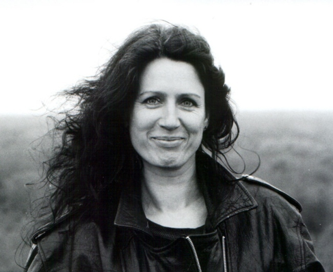 Ilona Schlott, Foto Heinrich Pawlick